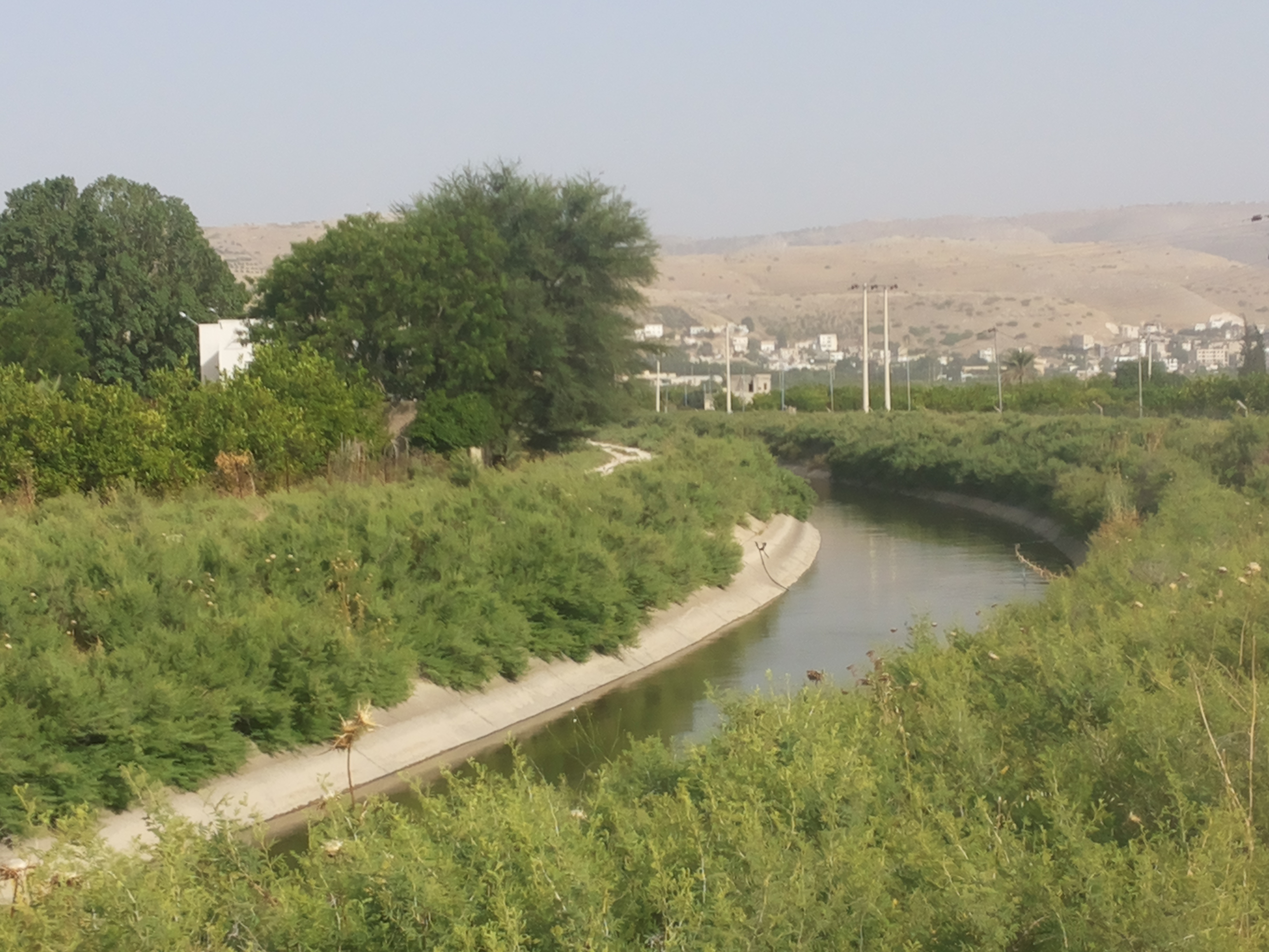 قناة الملك عبدالله (قناة الغور الشرقية) قرب الباقورة في محافظة إربد، الأردن.